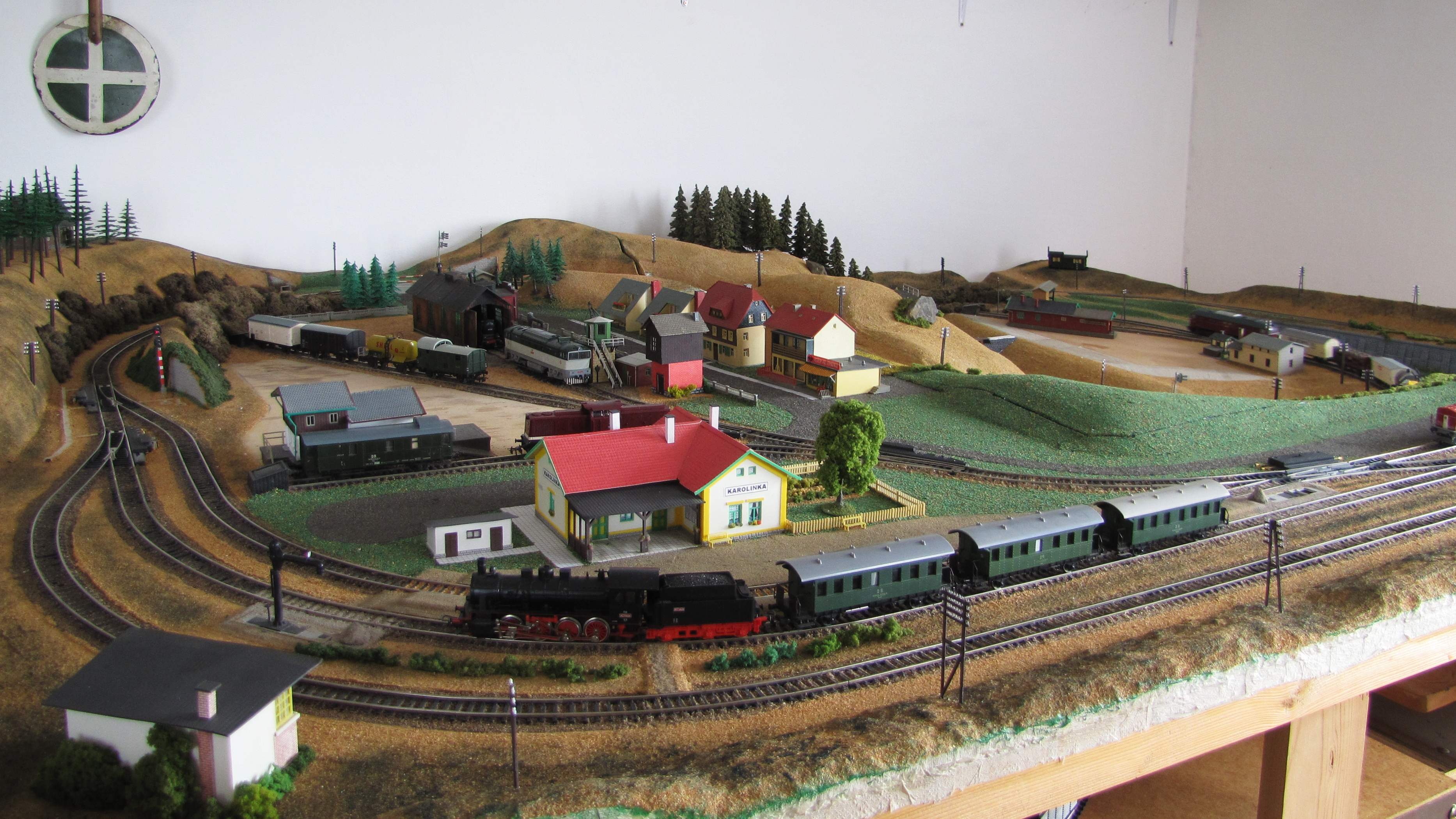 Železniční muzeum Stavědlo v Kyjově - model železnice velikosti H0